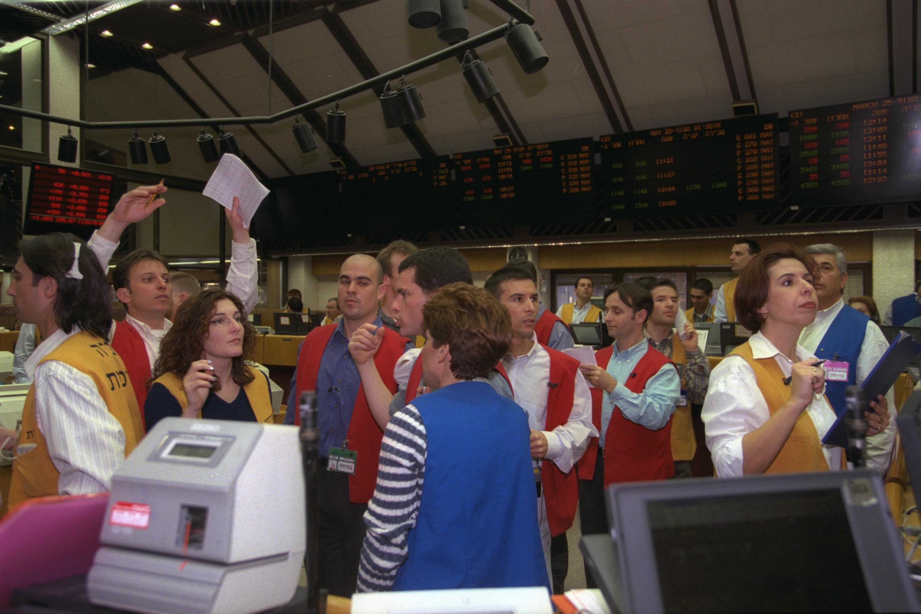 The Tel Aviv Stock Exchange. In the photo, stockbrokers at work. הבורסה לניירות ערך בתל אביב. בתמונה: סוכני הבורסה בפעולה Photo: AMOS BEN GERSHOM, 02/10/1999